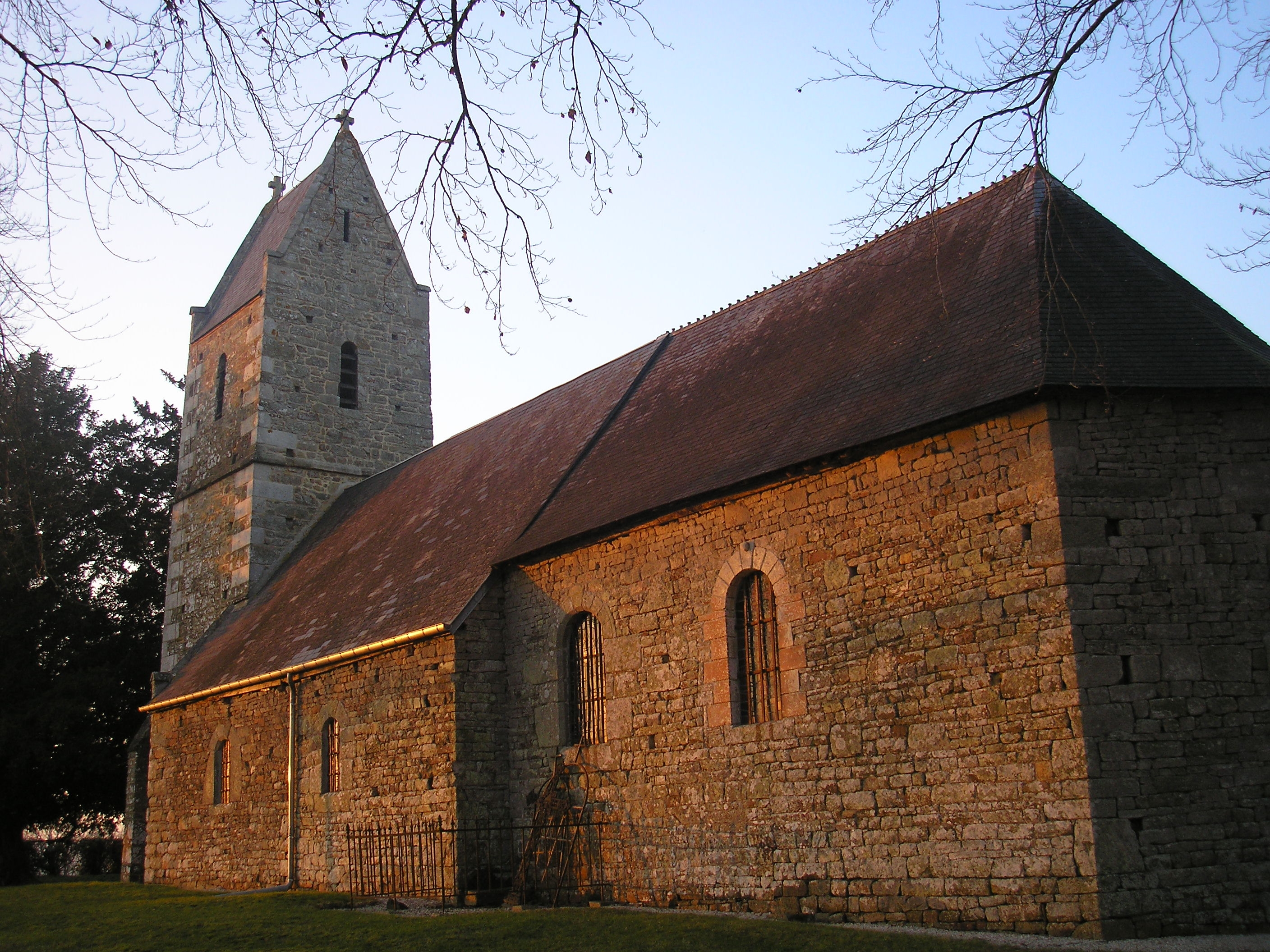 Malloué (Normandie, France). L'église Notre-Dame.